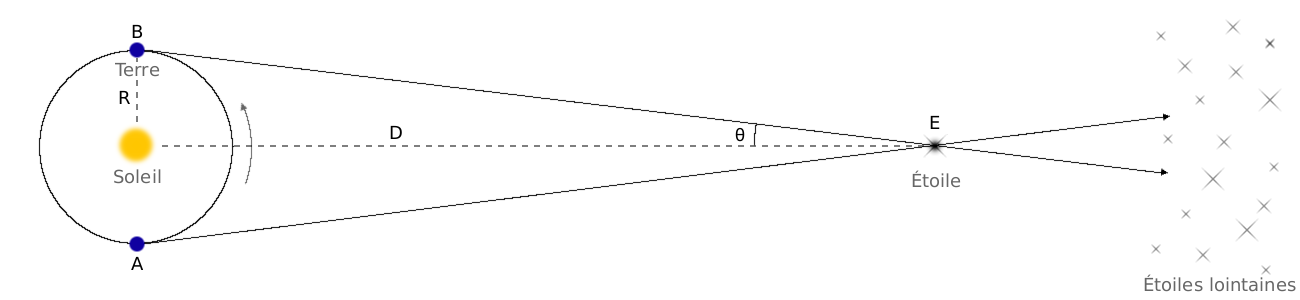 Description : Parallaxe annuelle. Source : Dhenry ; schéma personnel. Licence